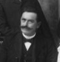 הוגו וילנד